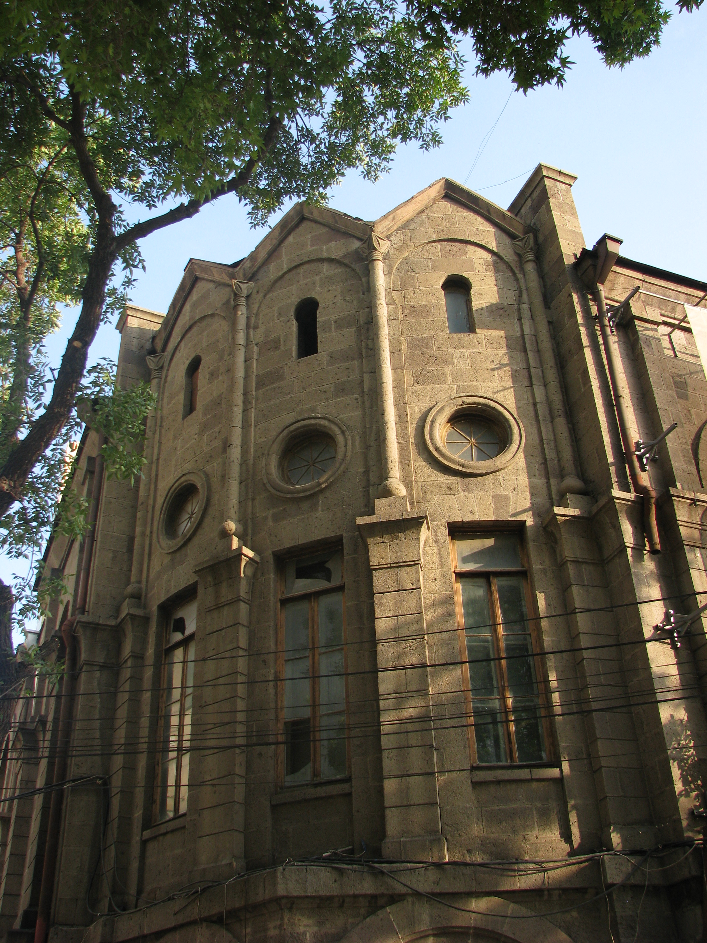 Գյուղբանկի շենքը կառուցվել է 1927-1930 թթ. Նիկողայոս Բունիաթյանի նախագծով 6/97